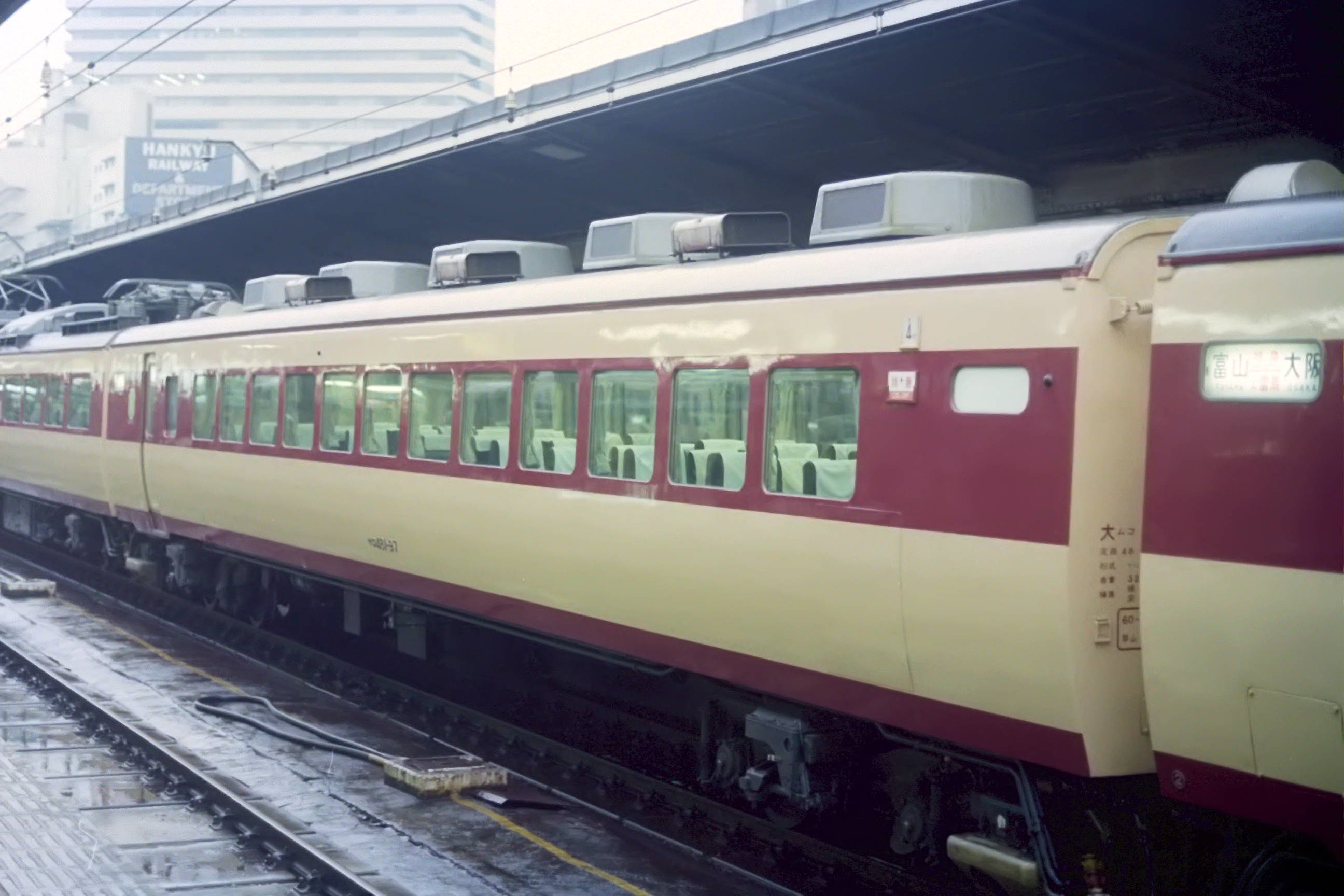 サロ481-97 大阪駅